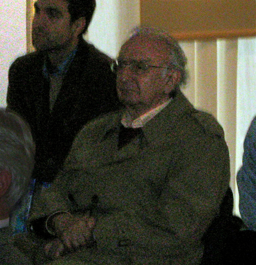 Миодраг Павловић у Галерији САНУ, октобар 2007. године